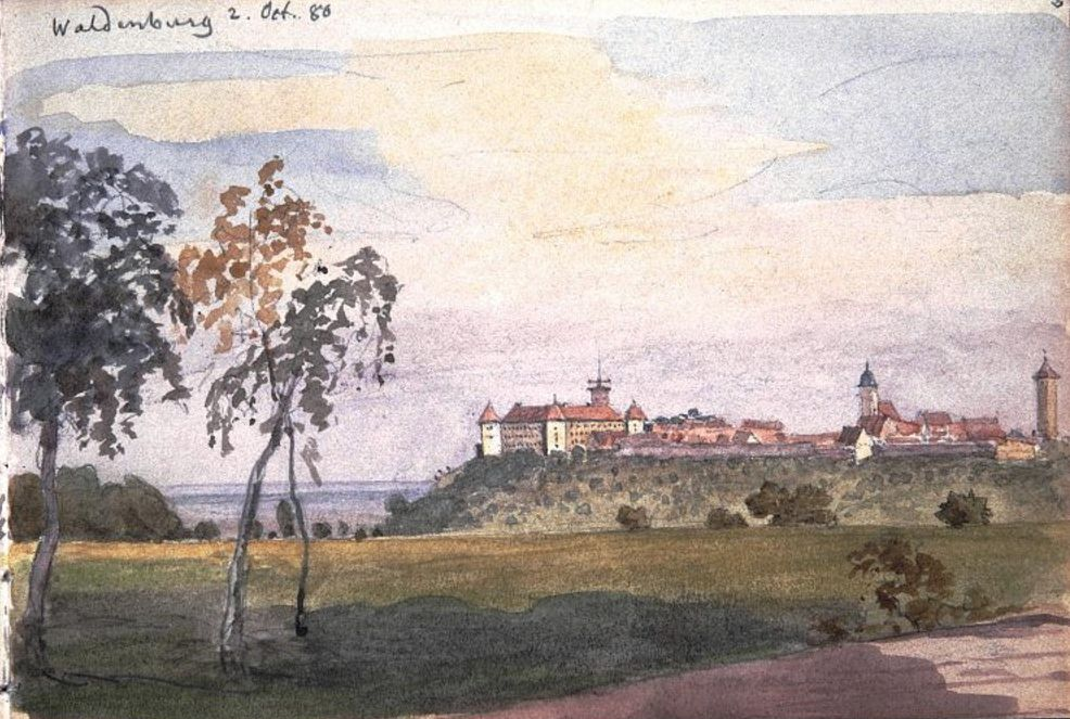 Waldenburg (Württemberg) Aquarell von Eduard von Kallee 2. Oktober 1880